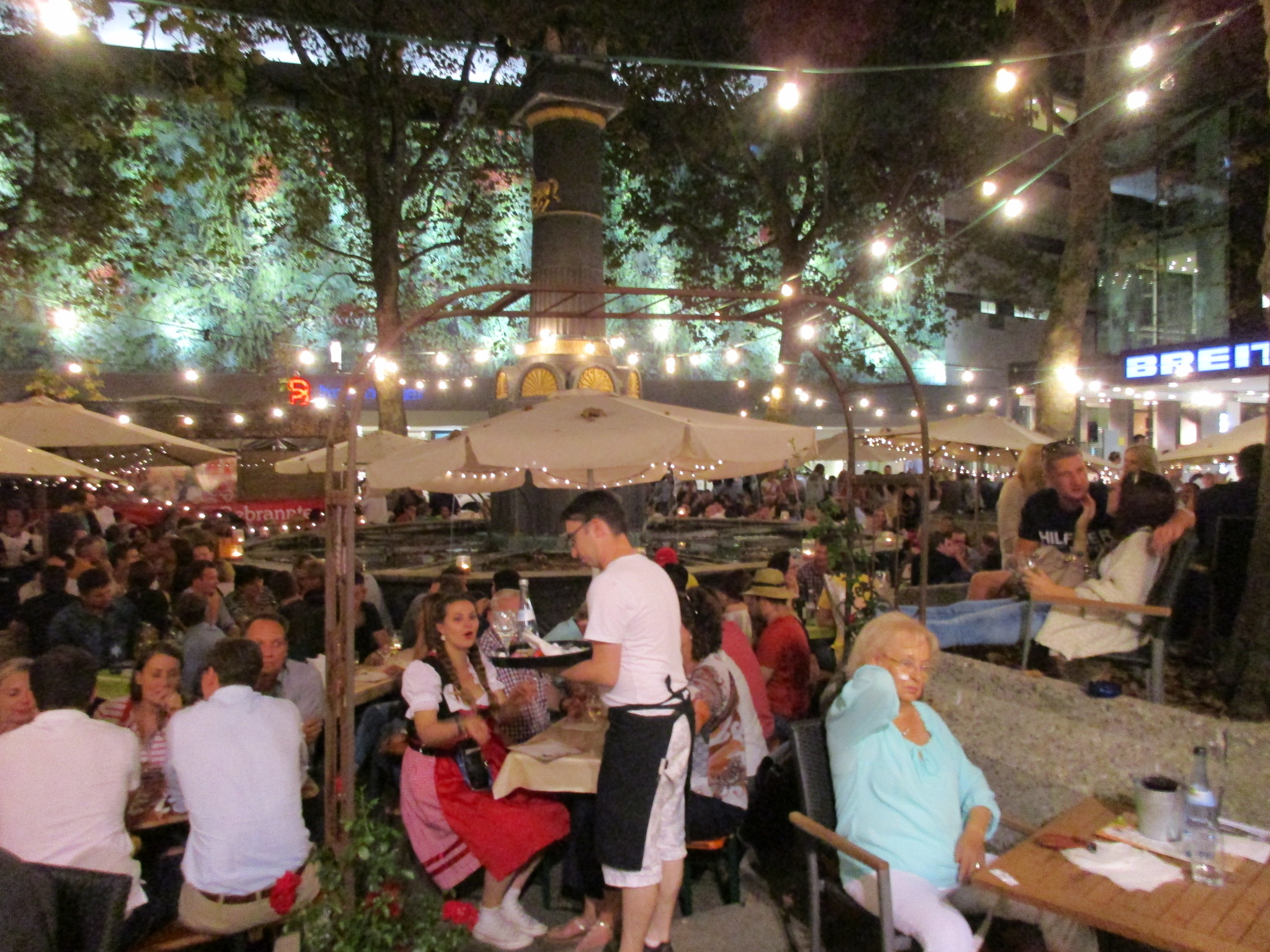 Stuttgarter Weindorf